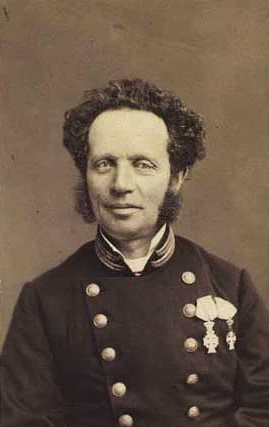 Hansen, Georg E. Fot.